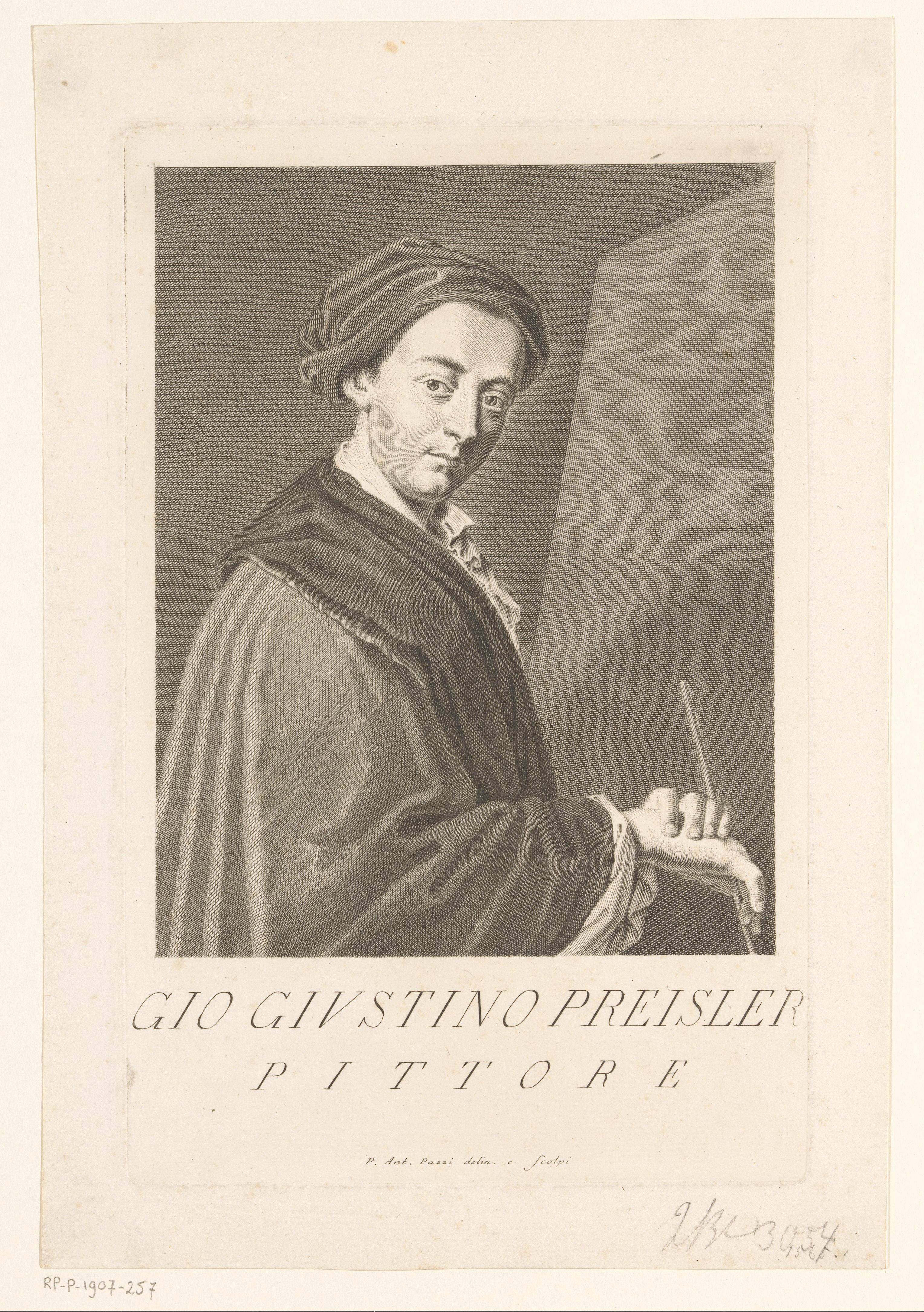 IdentificatieTitel(s): Portret van kunstenaar Johann Justin PreisslerPortretten van kunstenaars (serietitel)Objecttype: prent boekillustratie Objectnummer: RP-P-1907-257Catalogusreferentie: Collectie Rijksmuseum-1 of 2(2)Opschriften / Merken: verzamelaarsmerk, verso, gestempeld: Lugt 2228VervaardigingVervaardiger: prentmaker: Antonio Pazzi (vermeld op object)naar tekening van: Antonio Pazzi (vermeld op object)naar schilderij van: Johann Justin PreisslerPlaats vervaardiging: ItaliëDatering: 1752 - 1762Fysieke kenmerken: gravureMateriaal: papier Techniek: graveren (drukprocedé)Afmetingen: plaatrand: h 278 mm × b 180 mmToelichtingPrent naar geschilderd zelfportret van Johann Justin Preissler in de Galleria degli Uffizi te Florence (inv.nr. 1773). Prent uit: Moücke, Francesco. Serie di ritratti degli eccellenti pittori dipinti di propria mano, che esistono nell'Imiperial Galleria di Firenze. Florence: 1752-1762, dl. II, dl. 1.OnderwerpWat: historical personsportrait, self-portrait of paintertools, implements of painterWie: Johann Justin PreisslerVerwerving en rechtenVerwerving: aankoop 1905Copyright: Publiek domein